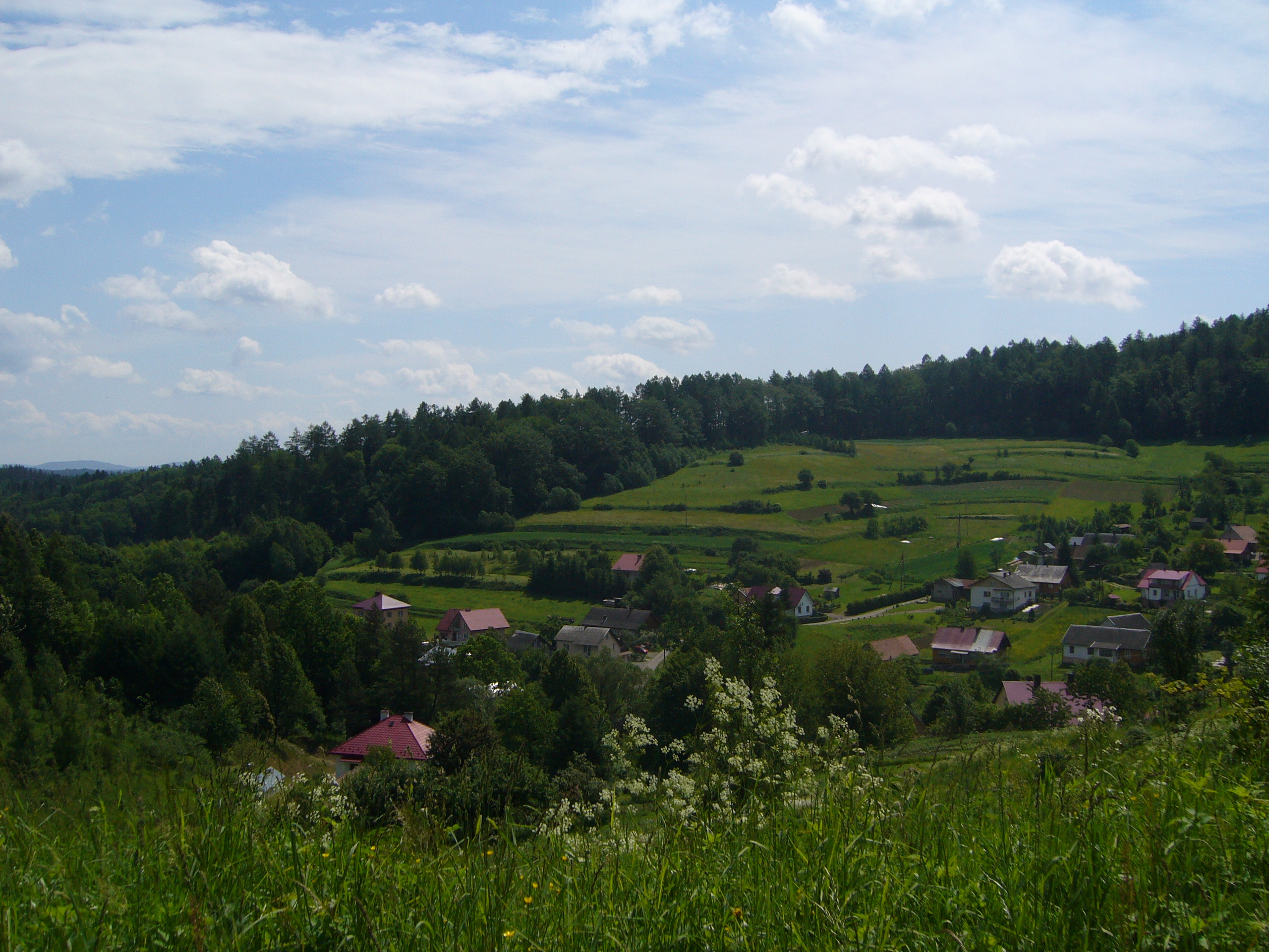 Krajobraz Poraża czerwiec 2009